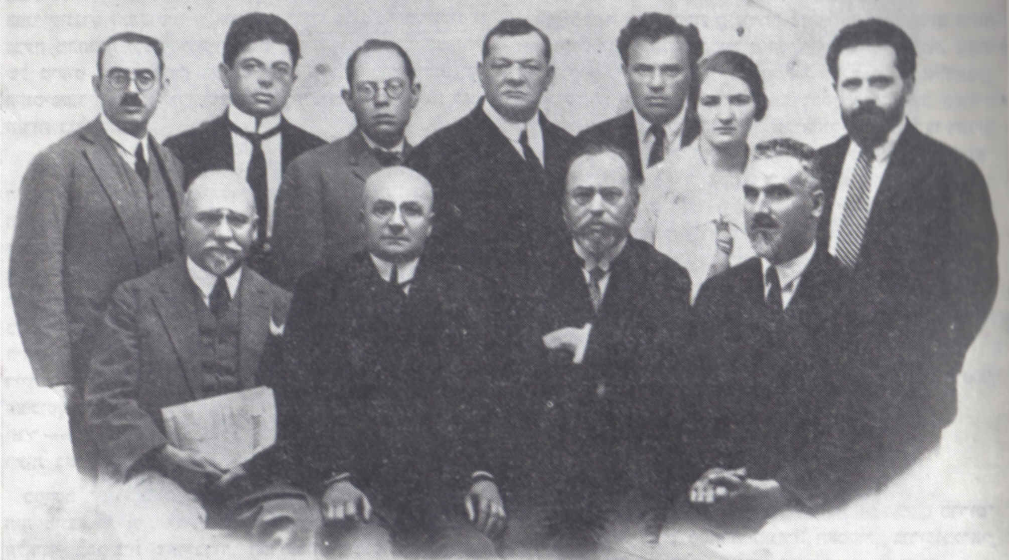 משלחת הקונסיסטוריה היהודית של בולגריה לקונגרס הבינלאומי של מיעוטים לאומיים שנערך בווינה ב-1930. בשורת העומדים ראשון משמאל, אלברט רומנו שהיה גם נשיא ההסתדרות הציונית בבולגריה ולימינו עו"ד נסים (בוקו) לוי. שני משמאל בשורת היושבים הקולונל בדימוס אברהם תג'ר. צולם בידי אלמוני